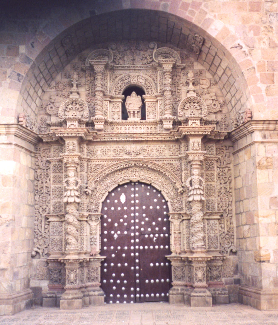 Porta da Igreja de San Lorenzo, Potosí, Bolívia